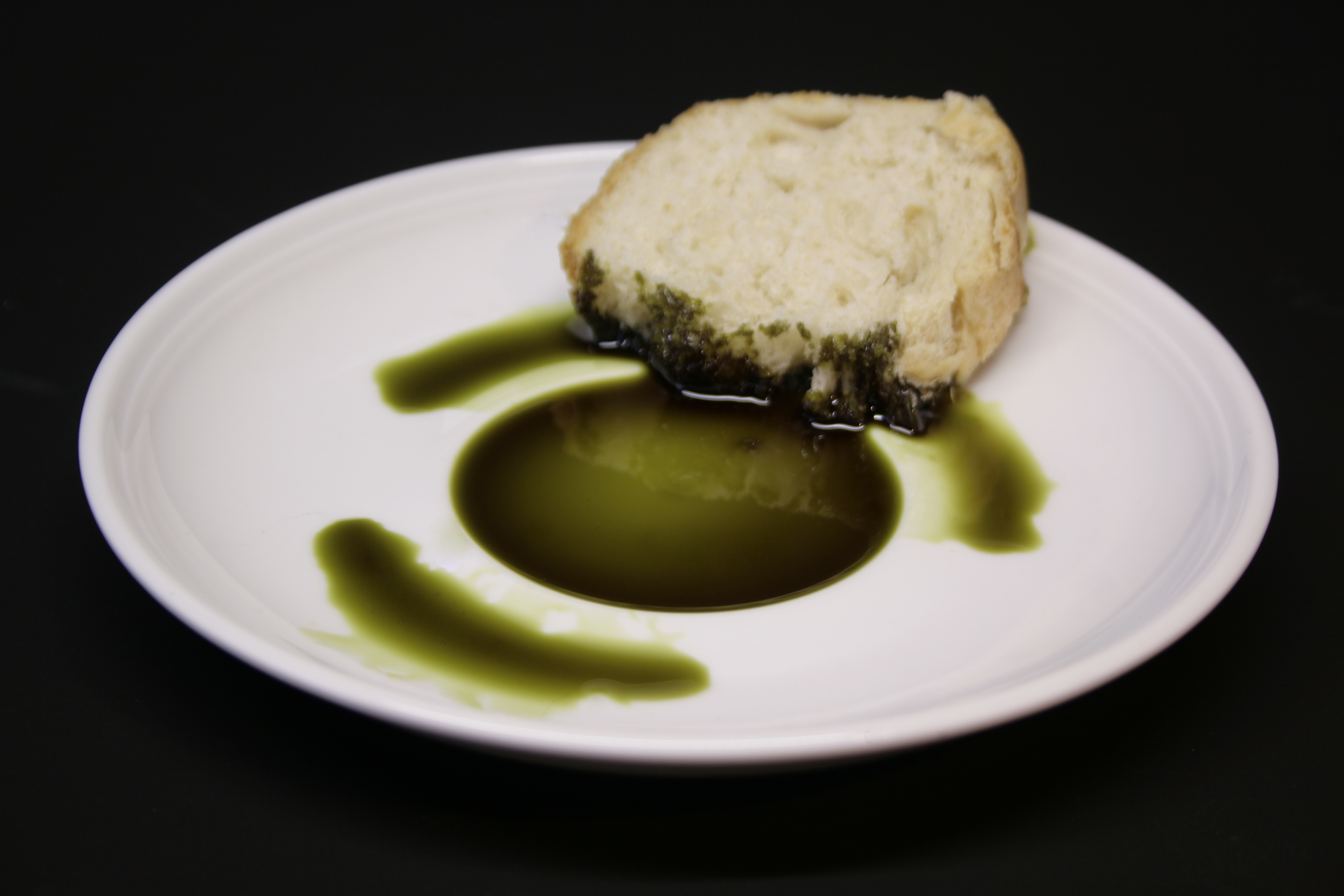 Kürbiskernöl